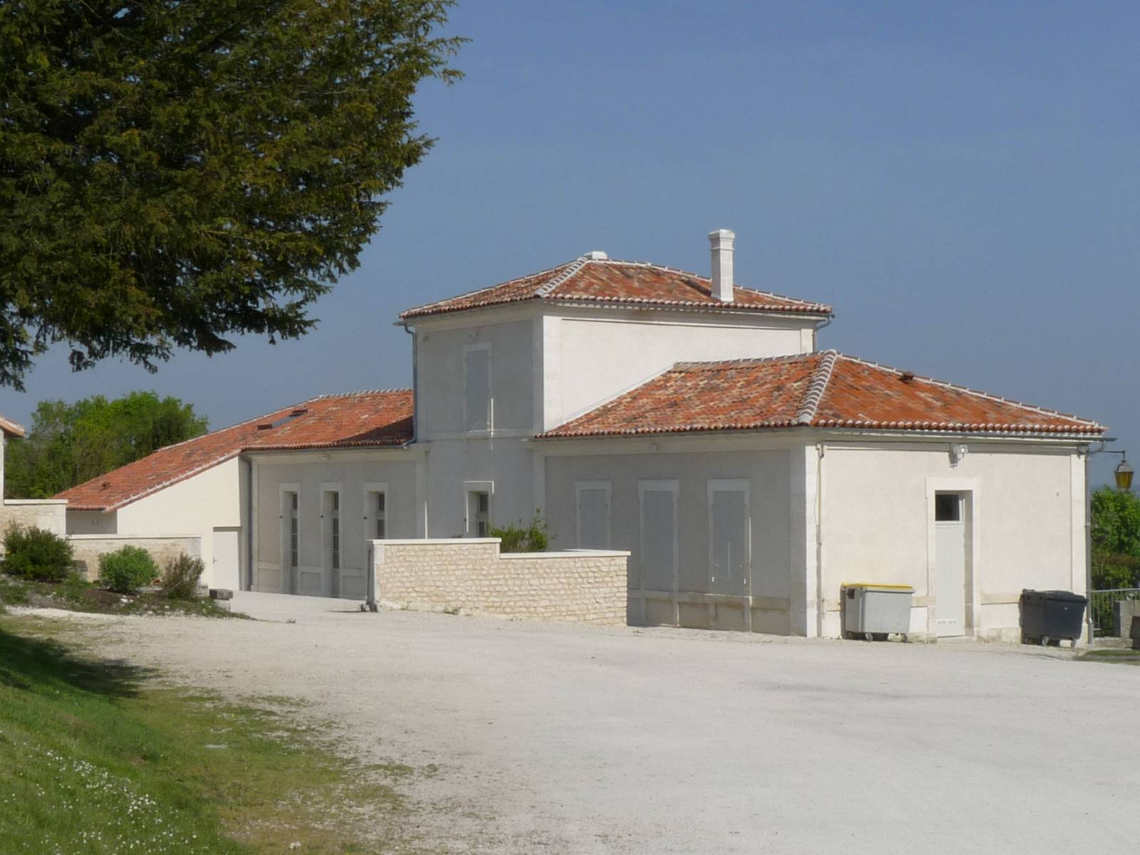 Salle communale de Genté, Charente, France